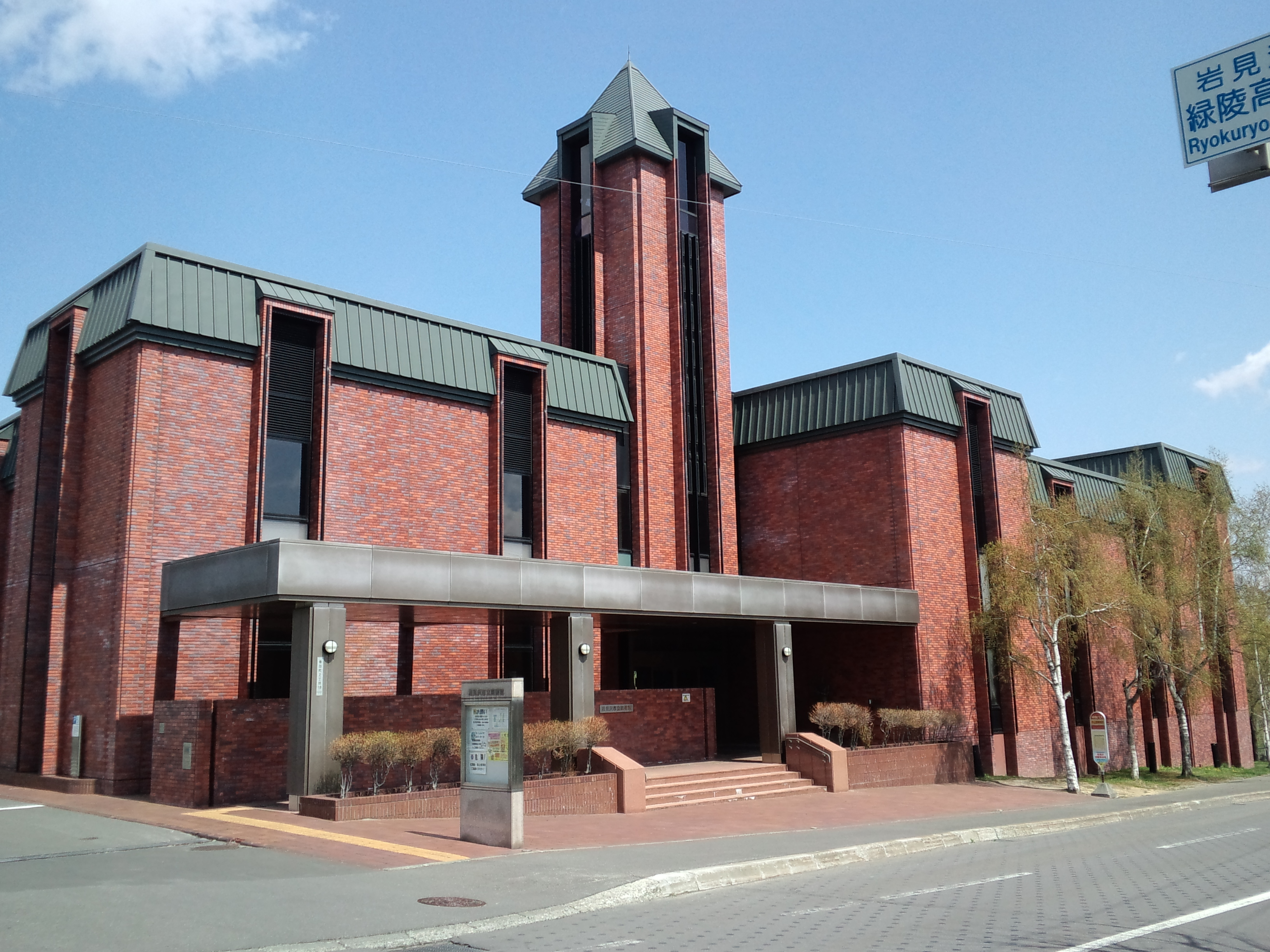 岩見沢市立図書館